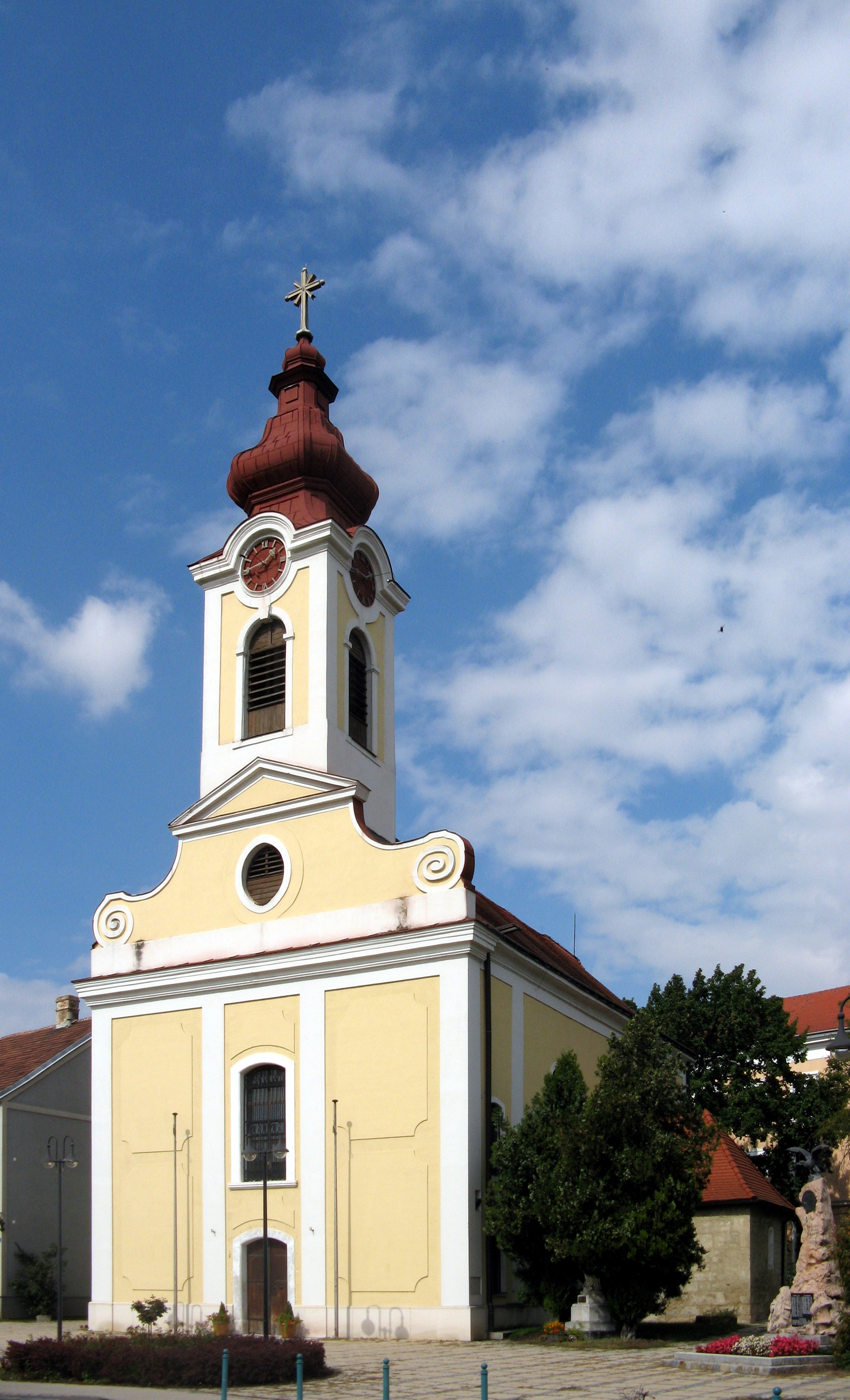 Pfarrkirche zu den Hll. Simon und Judas Thaddäus (1628), Vösendorf, Niederösterreich